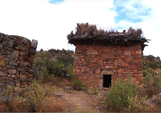 Chullpa mayor en Marcajirca, sitio arqueológico del periodo denominado Intermedio Tardío en la provincia de Huari, Áncash - Perú. Fotograma del 21 de junio de 2013, tomado durante el Proyecto de Investigación Arqueológica y Bioarqueológica Huari-Ancash